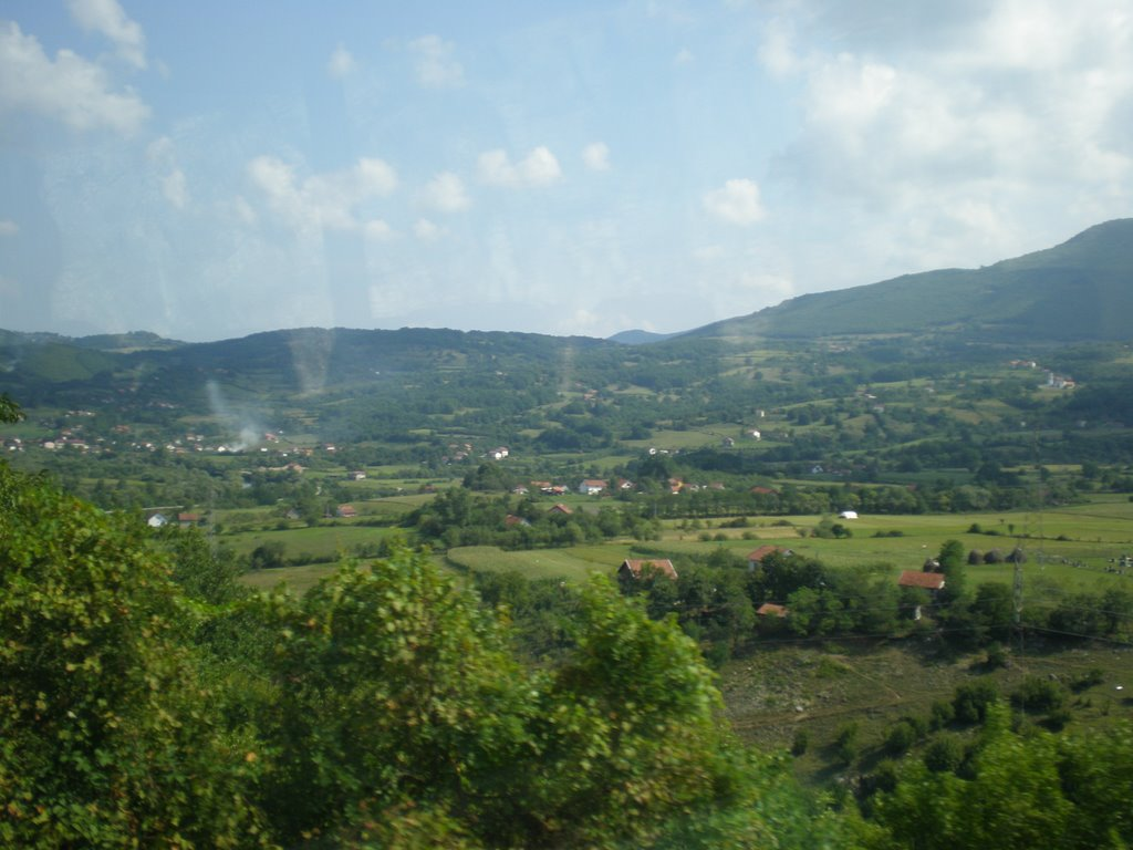 Selo Bočac.